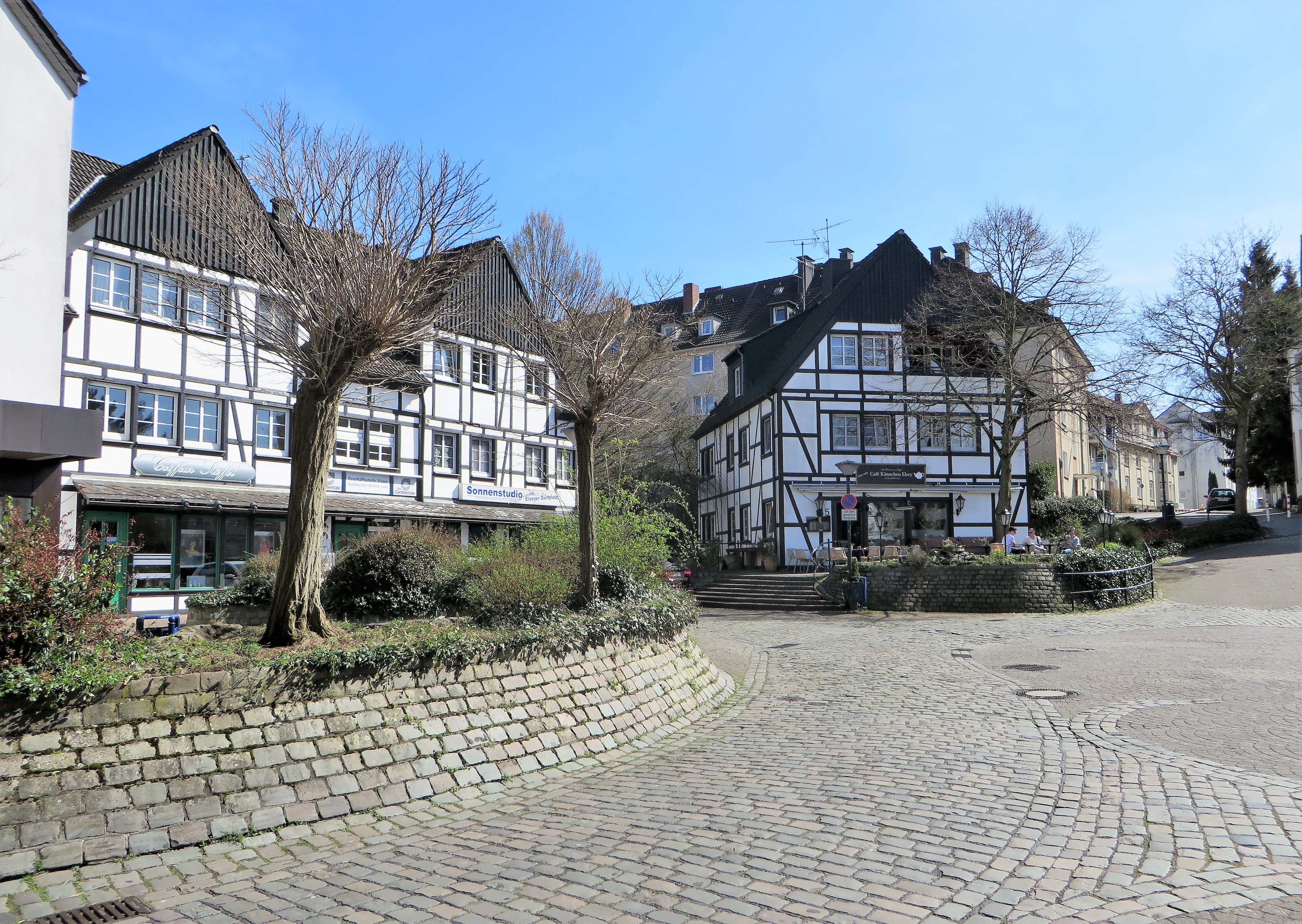 Elseyer Dorfplatz im Hagener Stadtteil Hohenlimburg. Rechts das „Café Kännchen Elsey“.